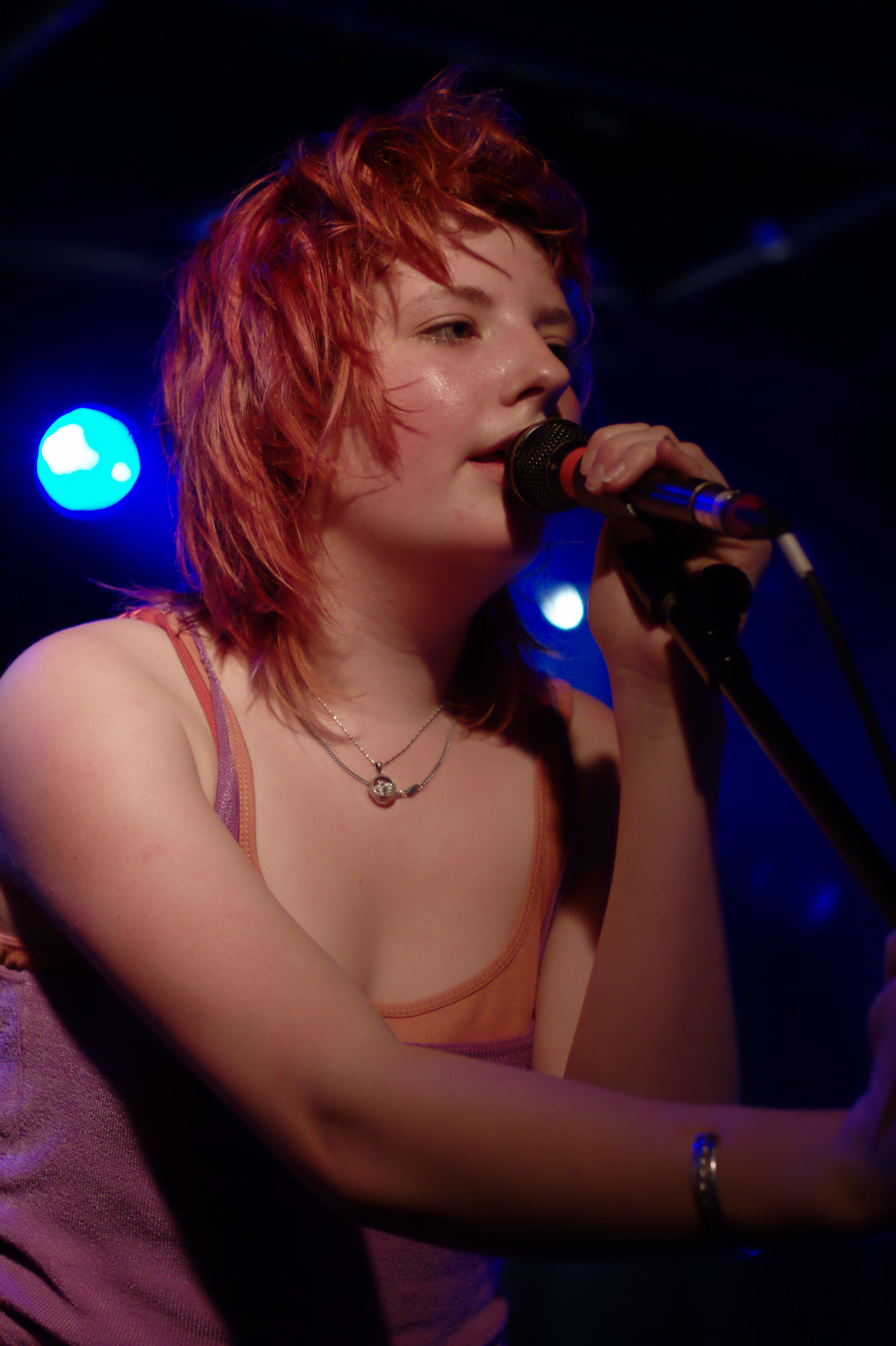 Roosbeef